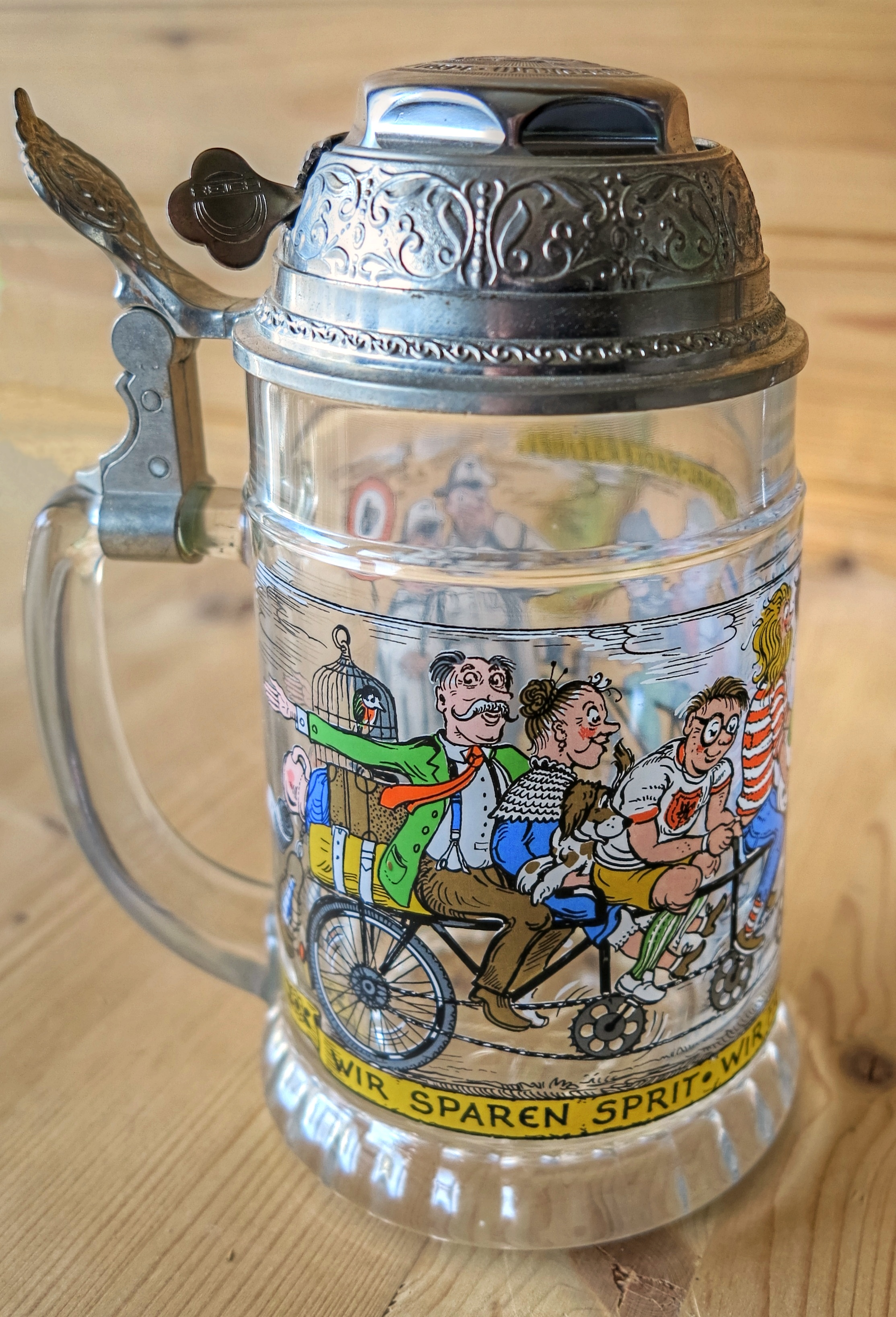 0,5 Liter Bierkrug mit Fahrradklingel